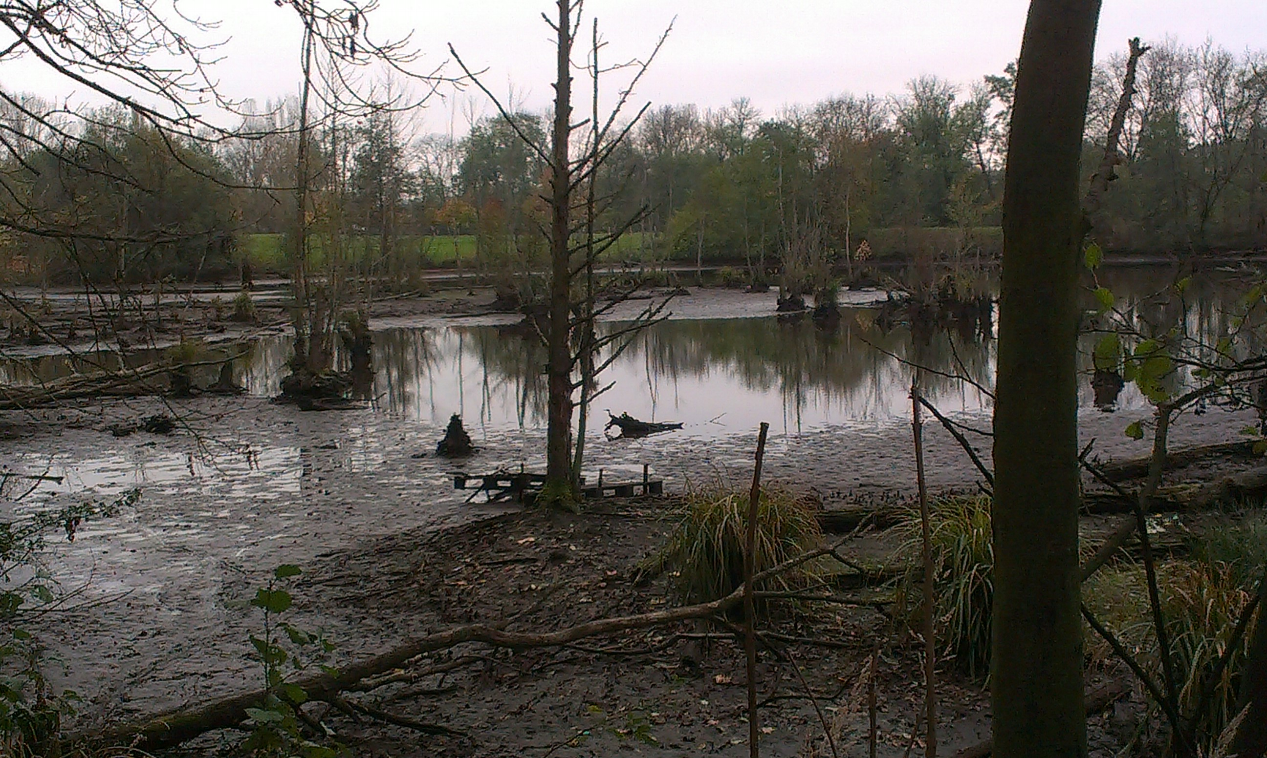 přírodní rezervace V pískovně